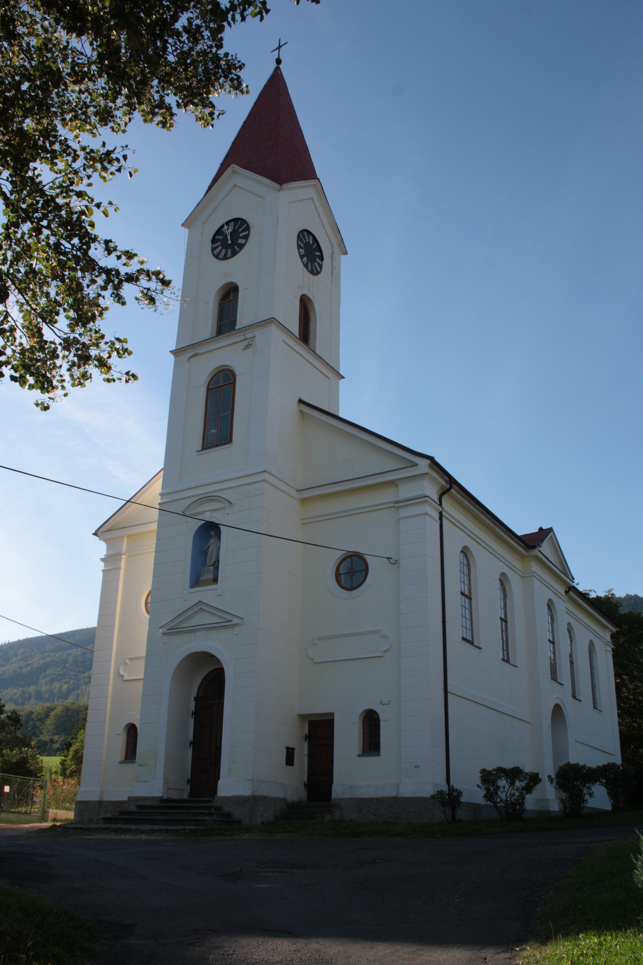 This photograph was taken with a DSLR from WMCZ's Camera grant. Kostel Nejsvětější Trojice v Bílém Potoce (pohled od severozápadu).